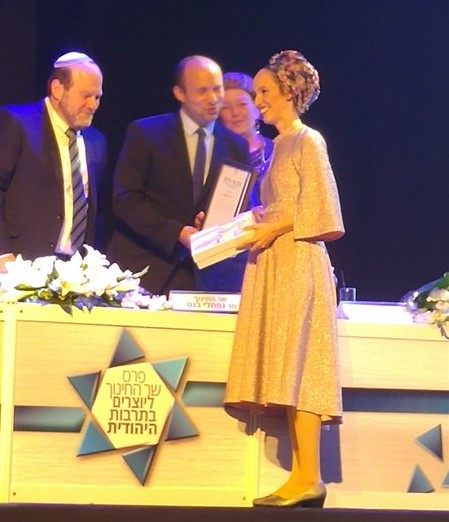 Raheli Moskovits